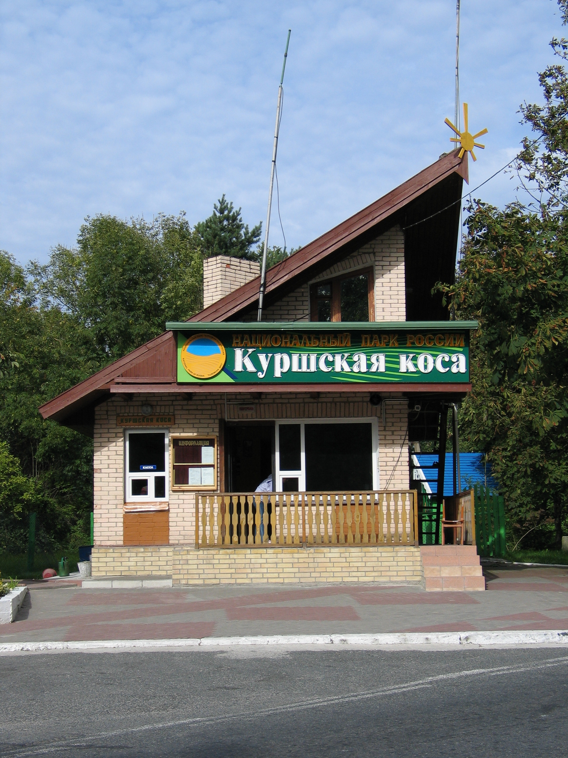 КПП «Куршская коса» с русской стороны